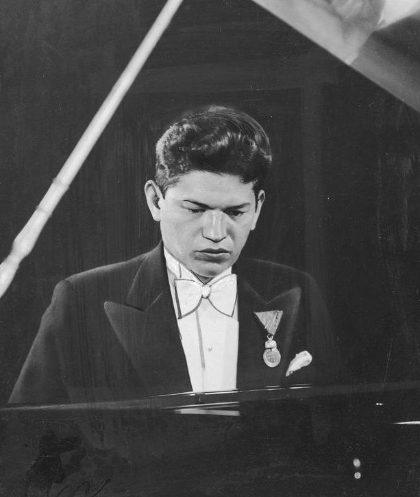 2nden:Chopin Competition laureate: Imre Ungar